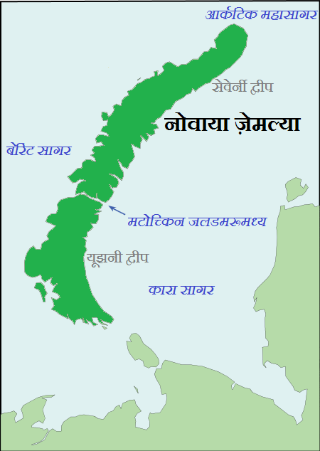 Novaya Zemlya